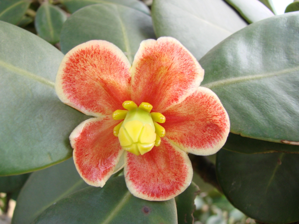 Clusia burchellii - CLUSIACEAE Parque Estadual Serra dos Pirineus - Pirenópolis - Goiás - Brasil.